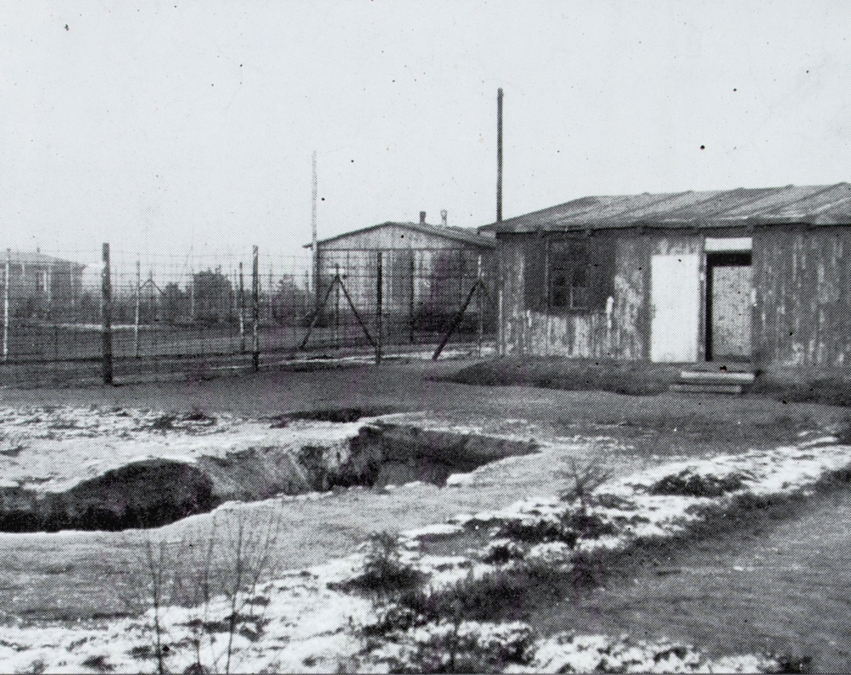 Öffentlich ausgestelltes Bild auf dem ehemalige Gelände des KZ Bergen-Belsen